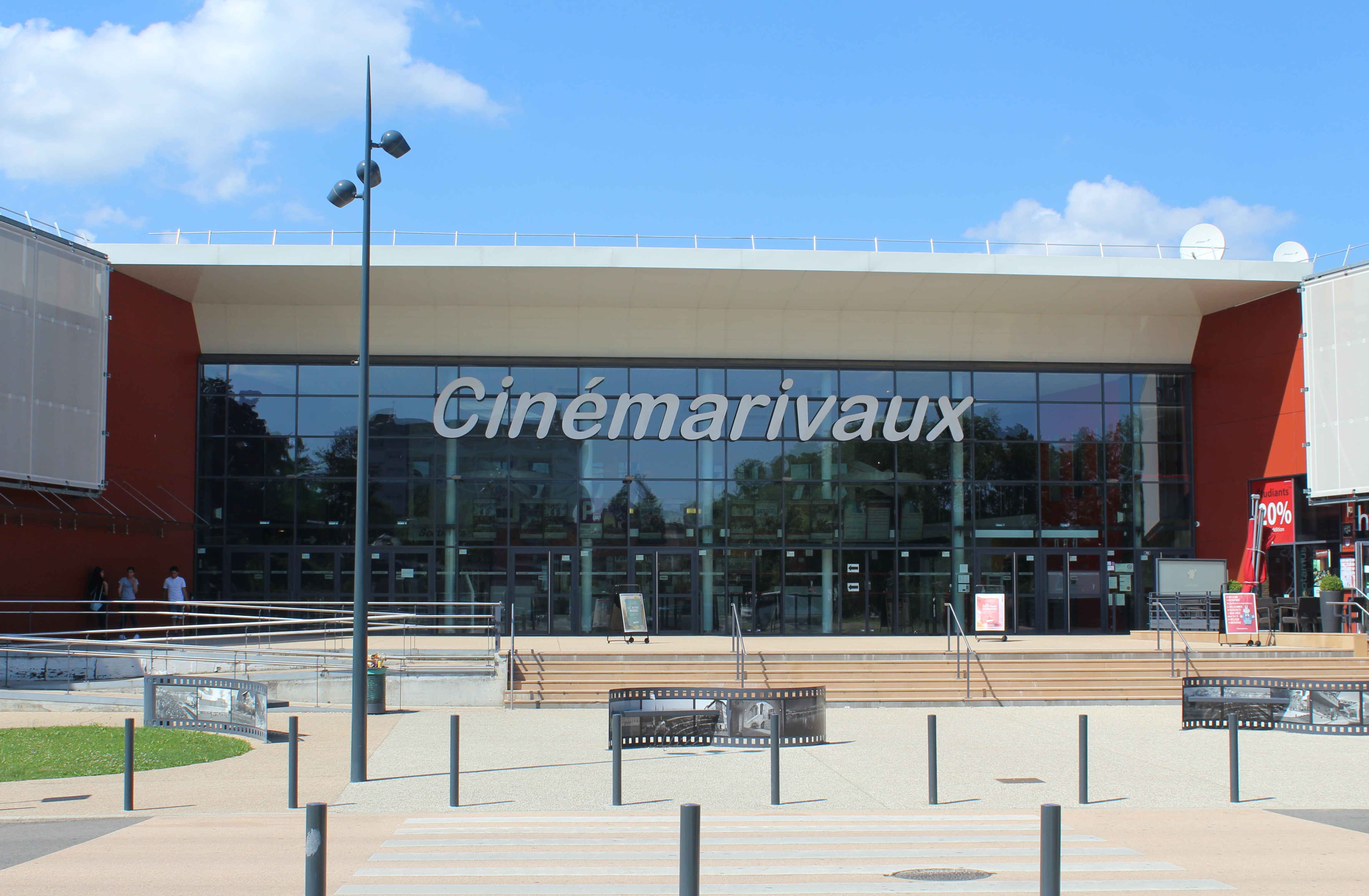 Le cinéma Cinémarivaux à Mâcon.